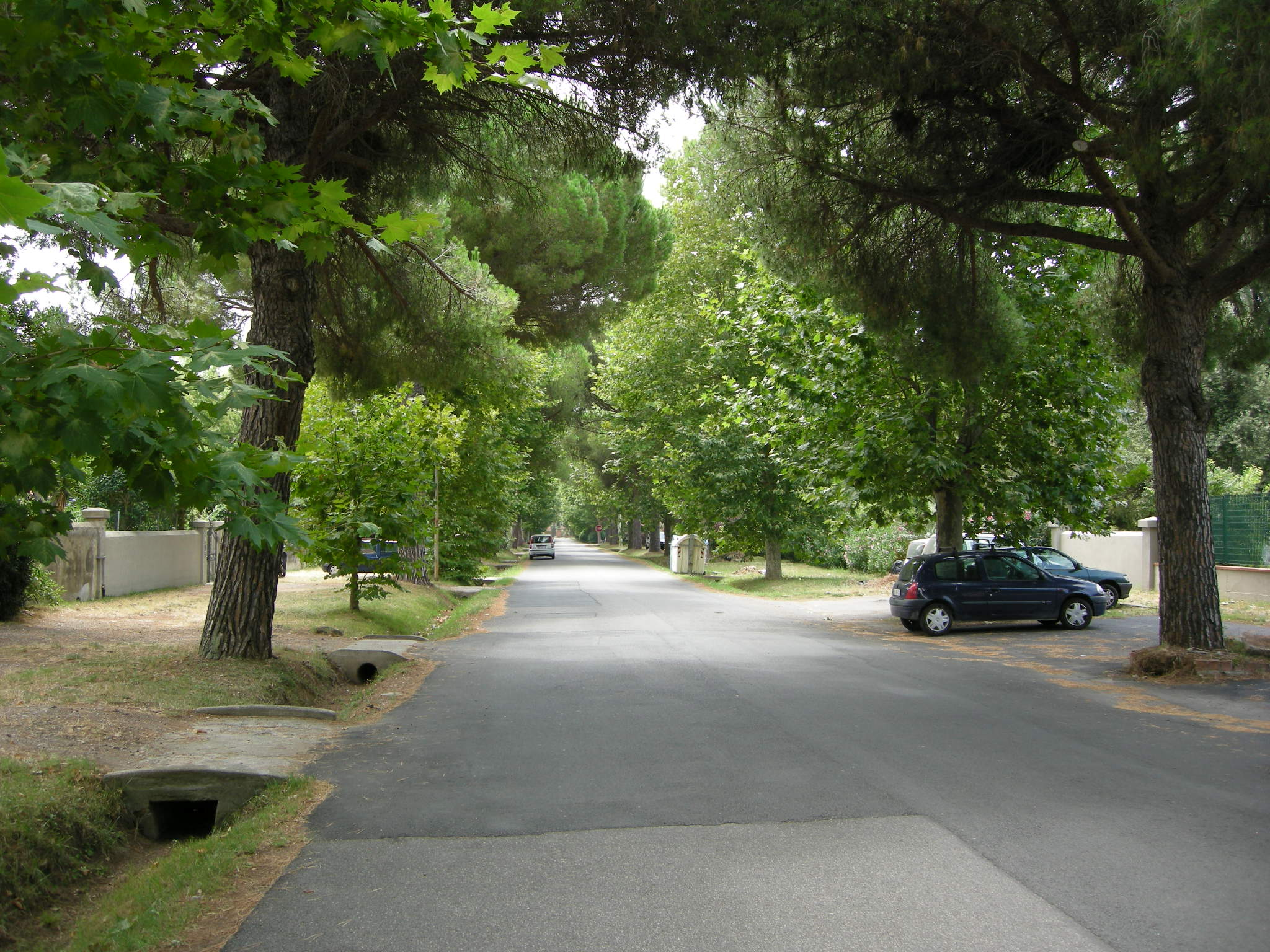 Villaggio solvay, viale alberato